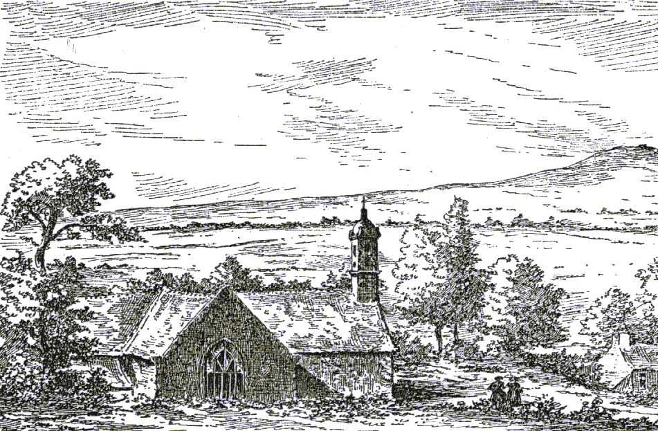 Photo d'une ancienne gravure du début XXème siècle représentant l'ancienne église de Botmeur et son cadre (Mont Saint-Michel de Brasparts à l'arrière-plan)d'origine inconnue